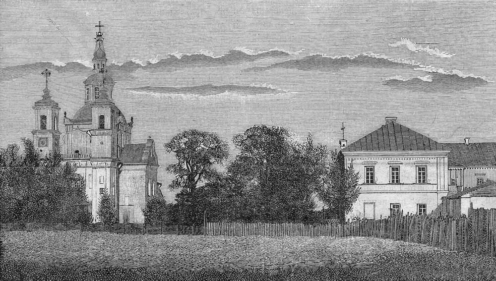 Беларуская (тарашкевіца): Слуцак (Słucak), Трайчаны (Trajčany). Манастыр Сьвятой Тройцы